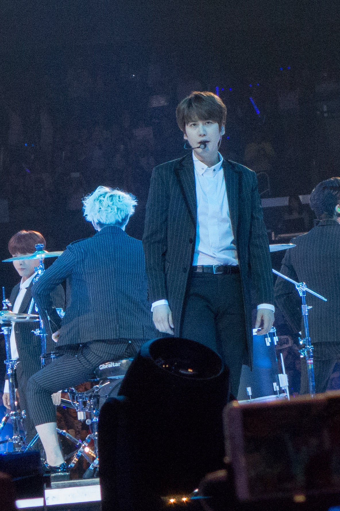 DSC02983-2